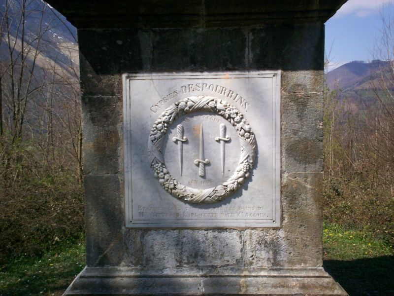 Era tripla espada, un simbèu d'Acós en sovenir deth triple duel ganhat peth pair de Ciprian Desporrins